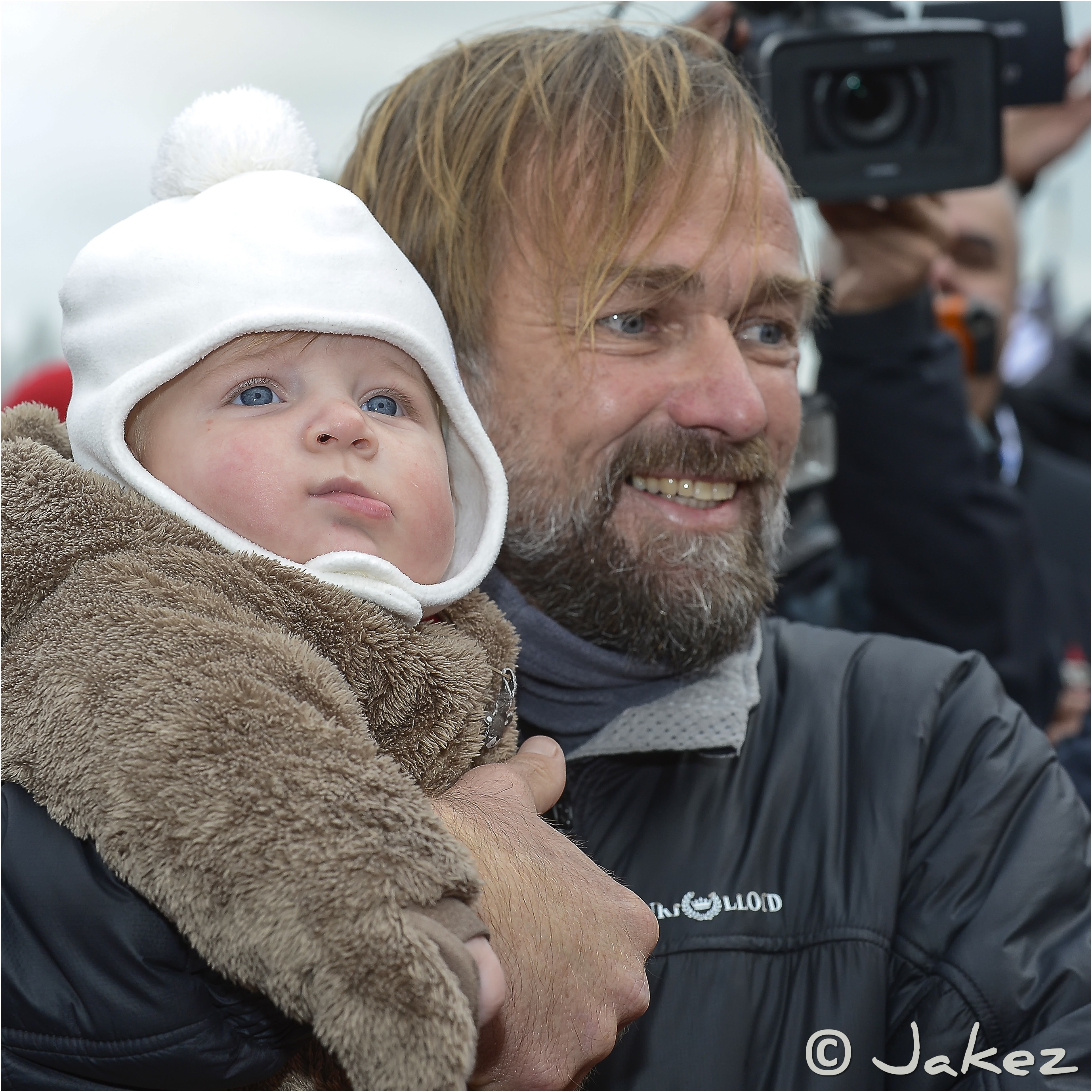 0168-Vendée 2012 (Ponton)